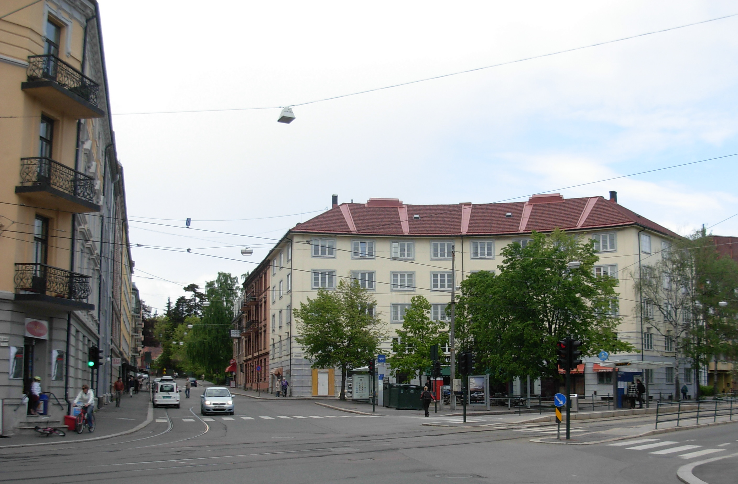 Adamstuen, streets Ullevålsveien, Thereses gate/Sognsveien, Oslo